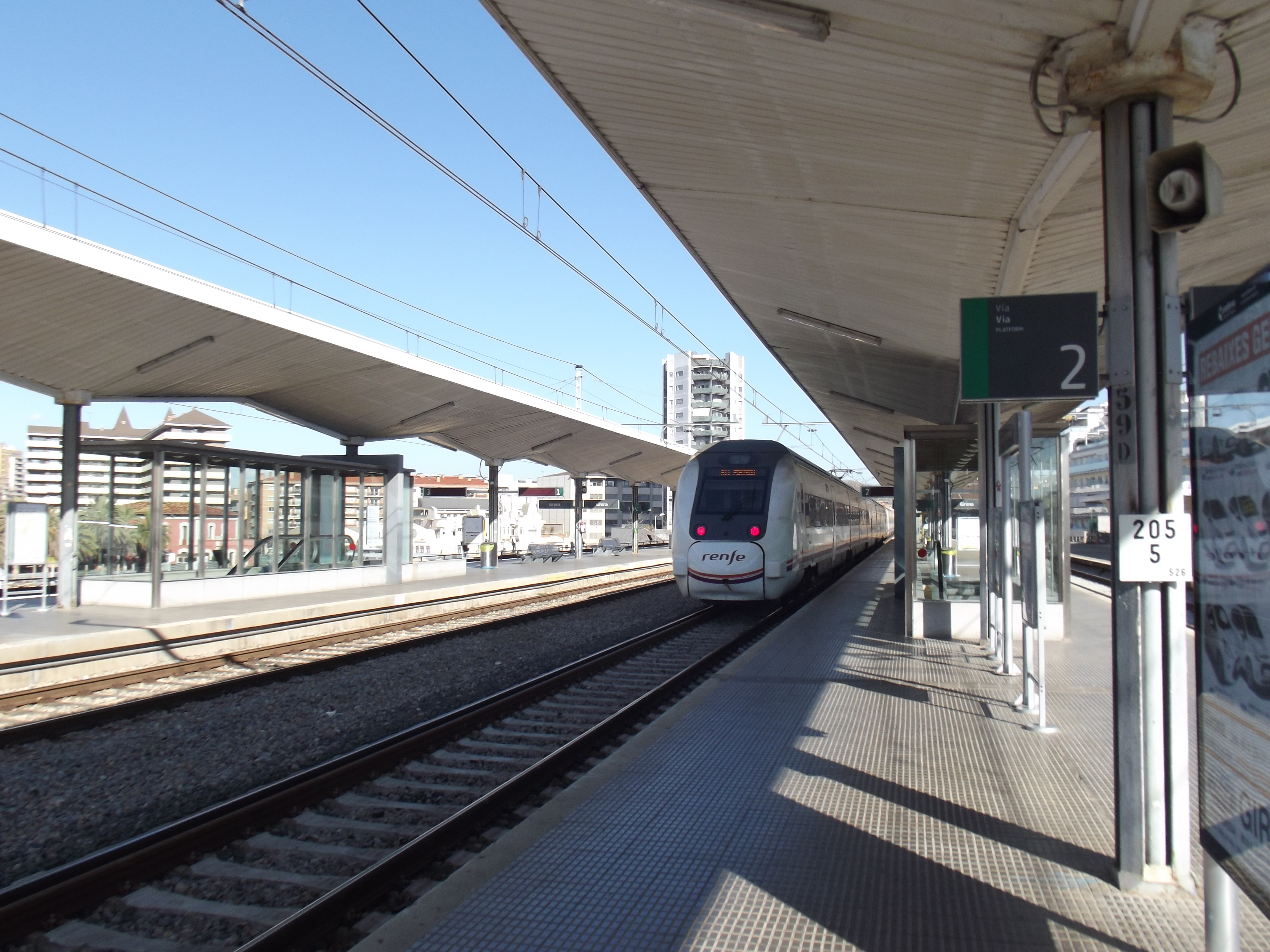 Regionale trein naar Portbou. Het spoor is geschikt voor zowel normaal spoor als Spaans breedspoor. Het normaalspoor was in gebruik voor goederentreinen.